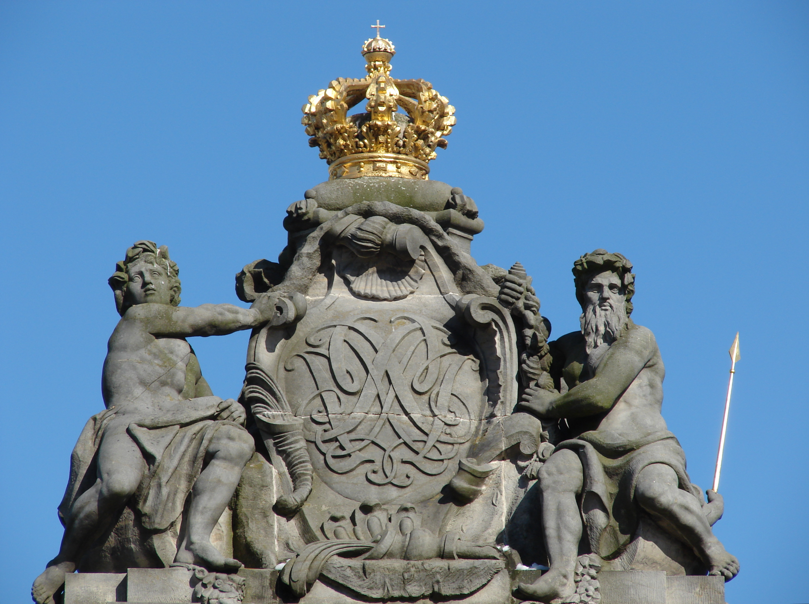 Dronning Sophie Magdalena af Danmark og Norges monogram på pavillon ved Christiansborgs gamle port ved Marmorbroen, København